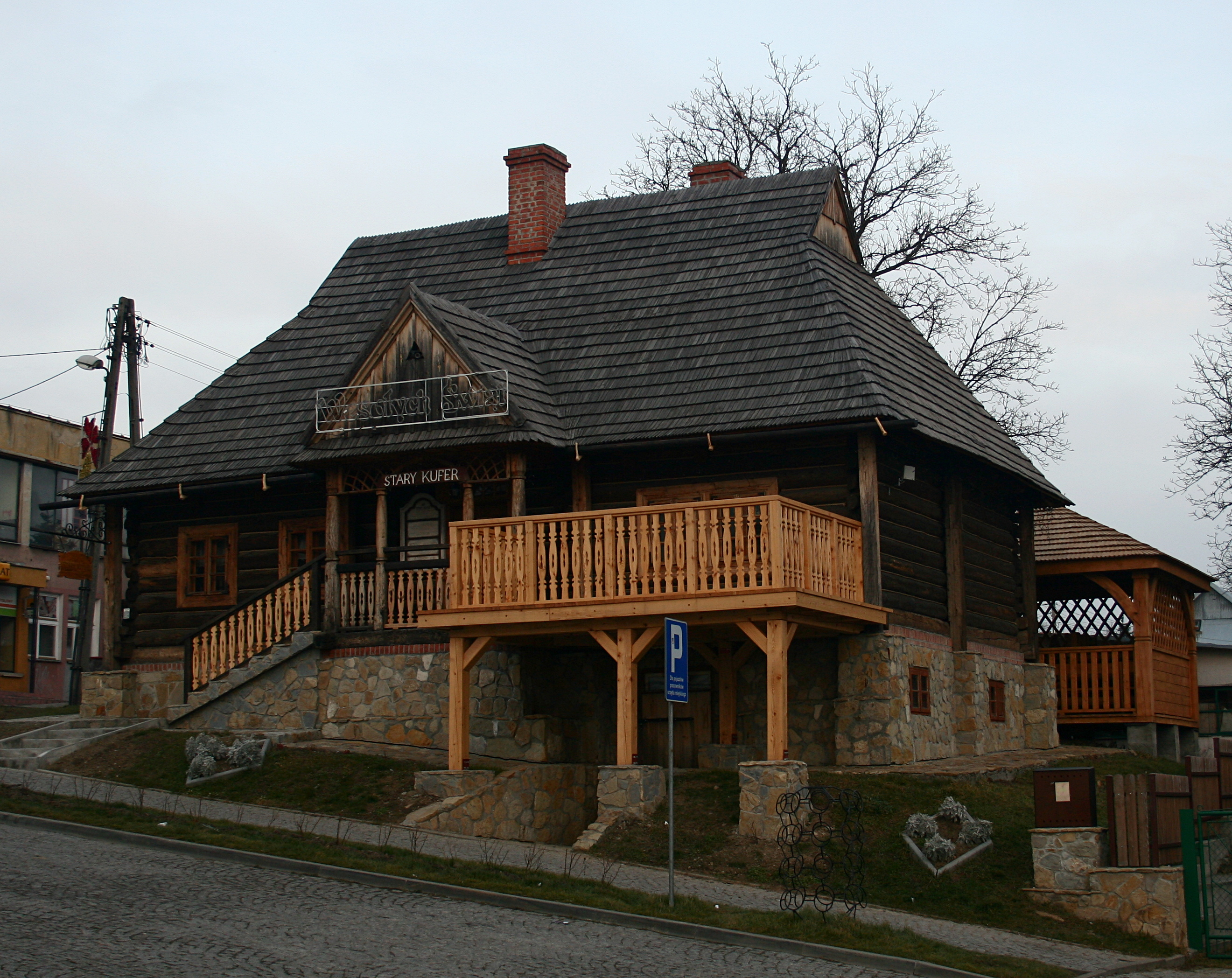 Dom w zabudowie rynku w Pruchniku